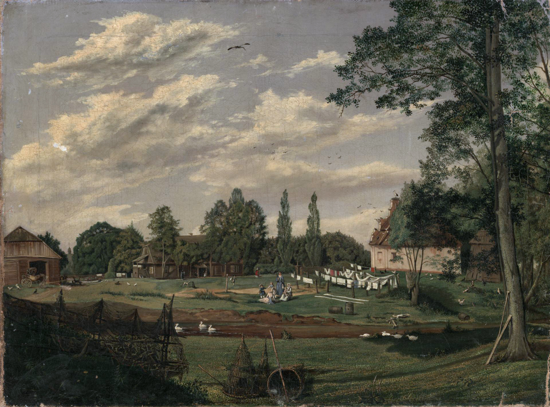 Беларуская (тарашкевіца): Нагародавічы (Naharodavičy)